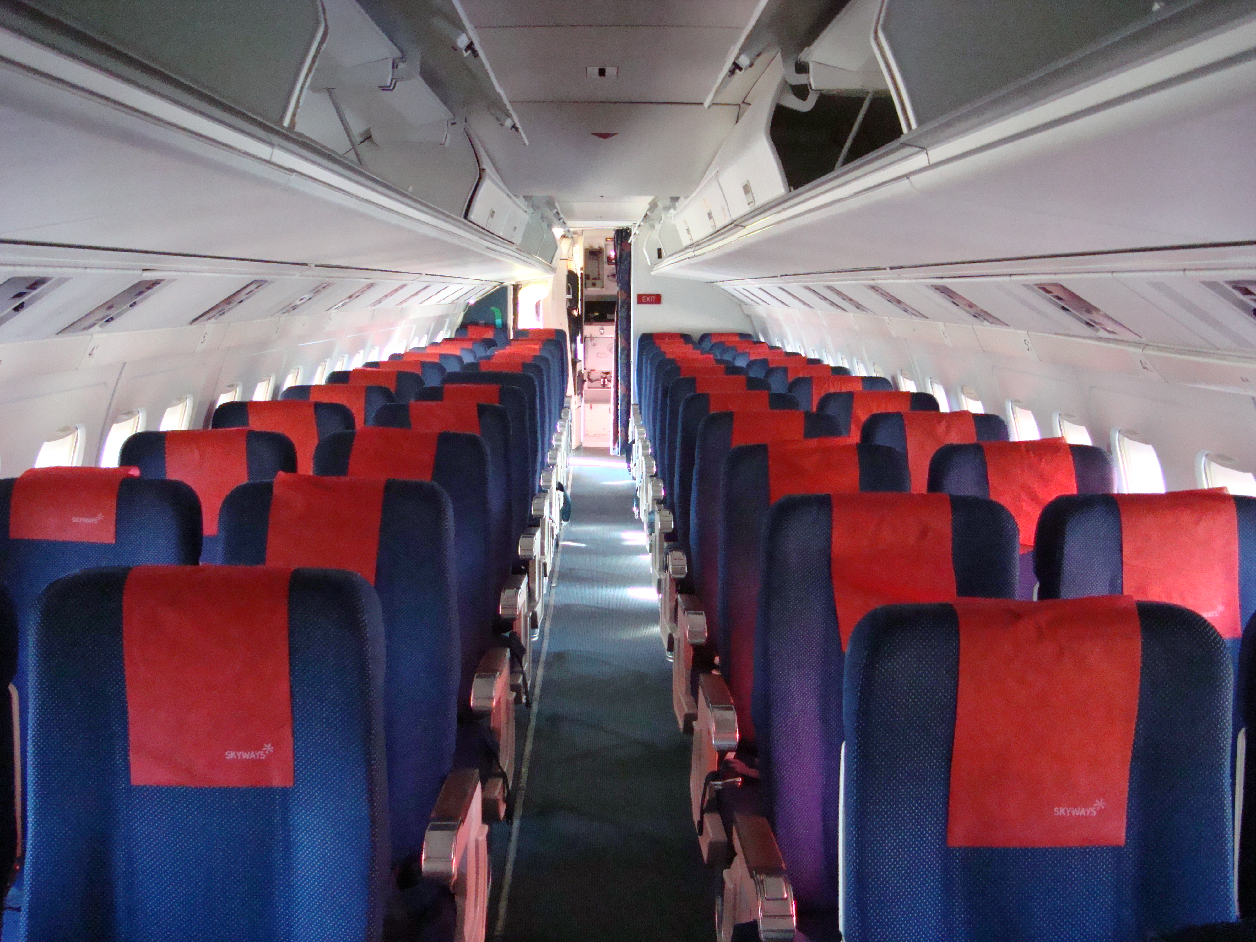 Inuti en Fokker 50 från Skyways